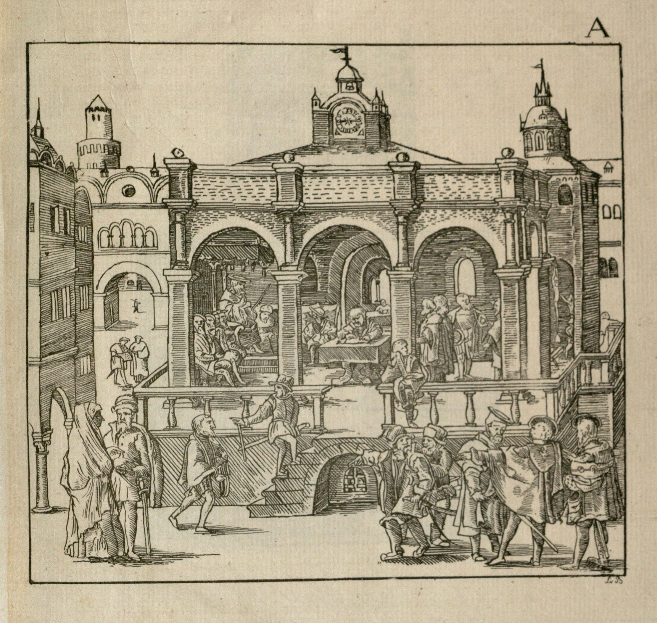 Tafel A: Plate A: "Eine öffentliche Gerichtssitzung aus dem 16ten Jahrhundert."